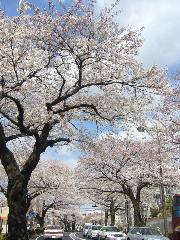 日立市平和通り(Hitachi Heiwa Street)